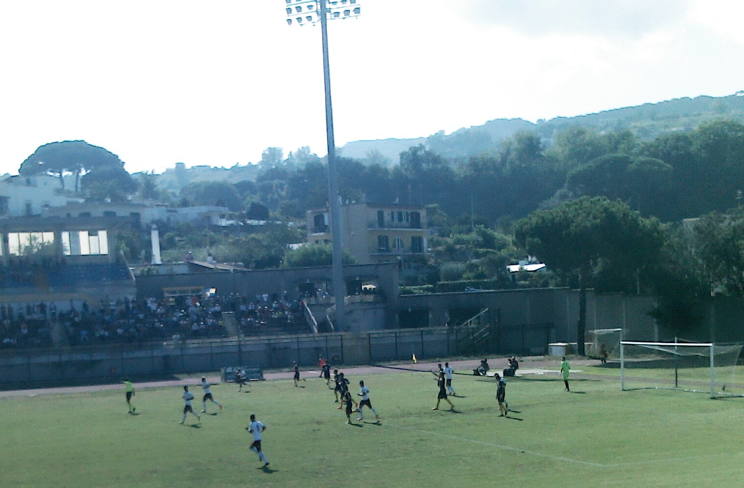 Ischia-Salernitana 1-0 Lega Pro 2014/15 24 settembre 2014